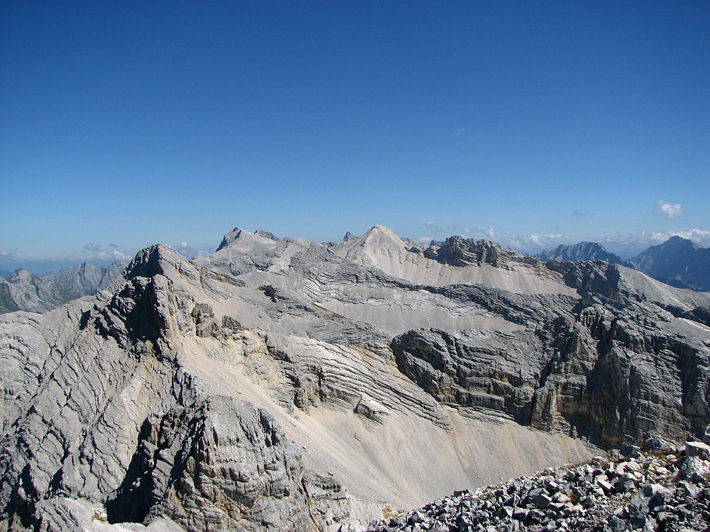 Die Hinterautal-Vomper-Kette im Karwendel